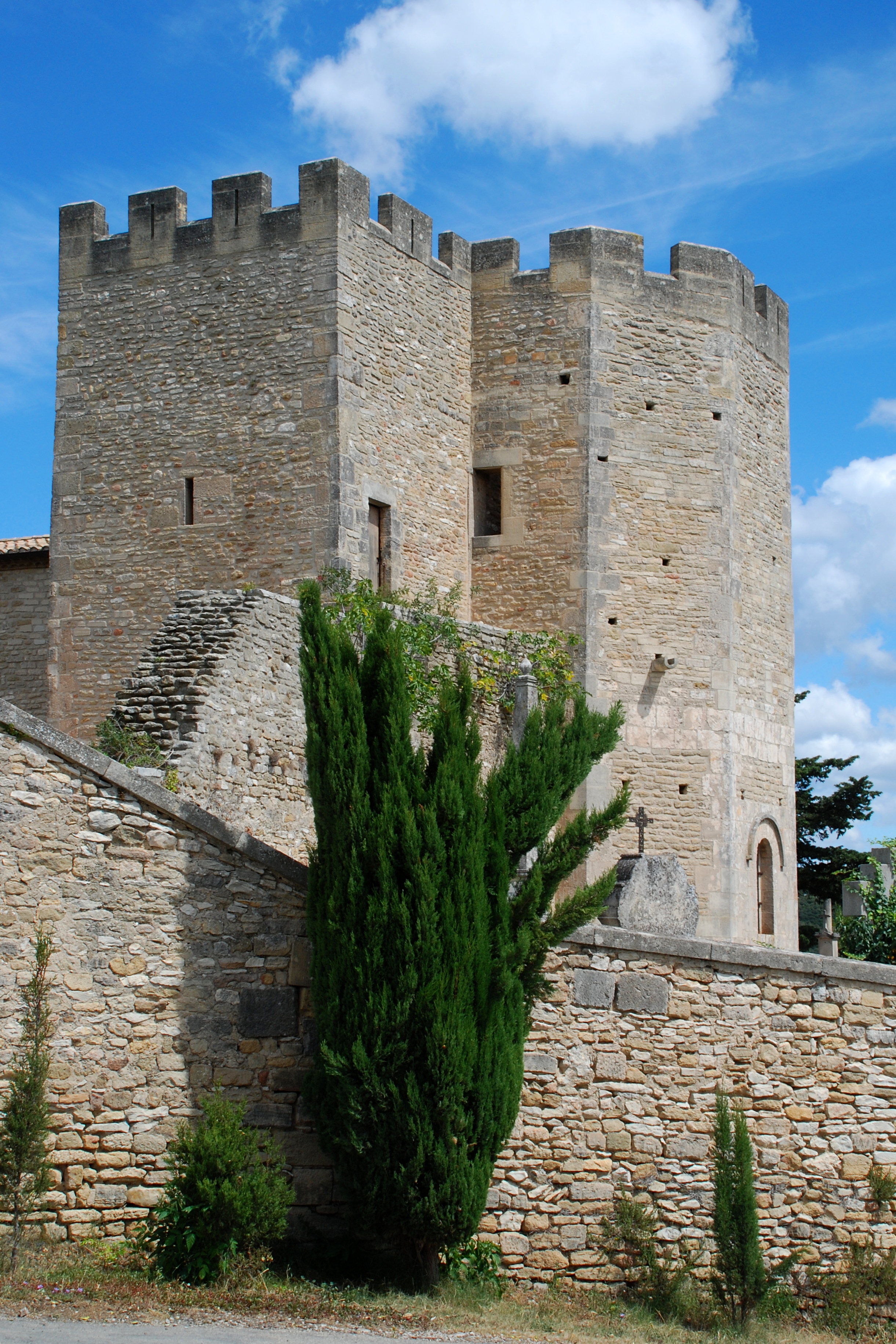 France - Languedoc - Gard - Église de Saint-Bonnet-du-Gard